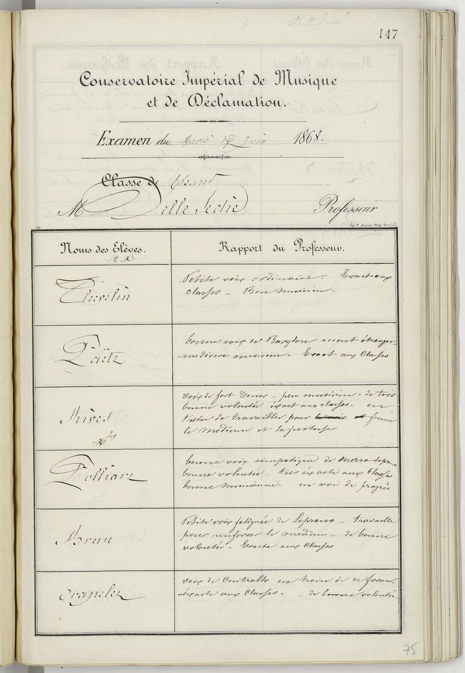 Rapport de la classe de chant du professeur de chant Enrico Delle Sedie, Conservatoire de musique de Paris. Archives nationales, AJ/37/281.